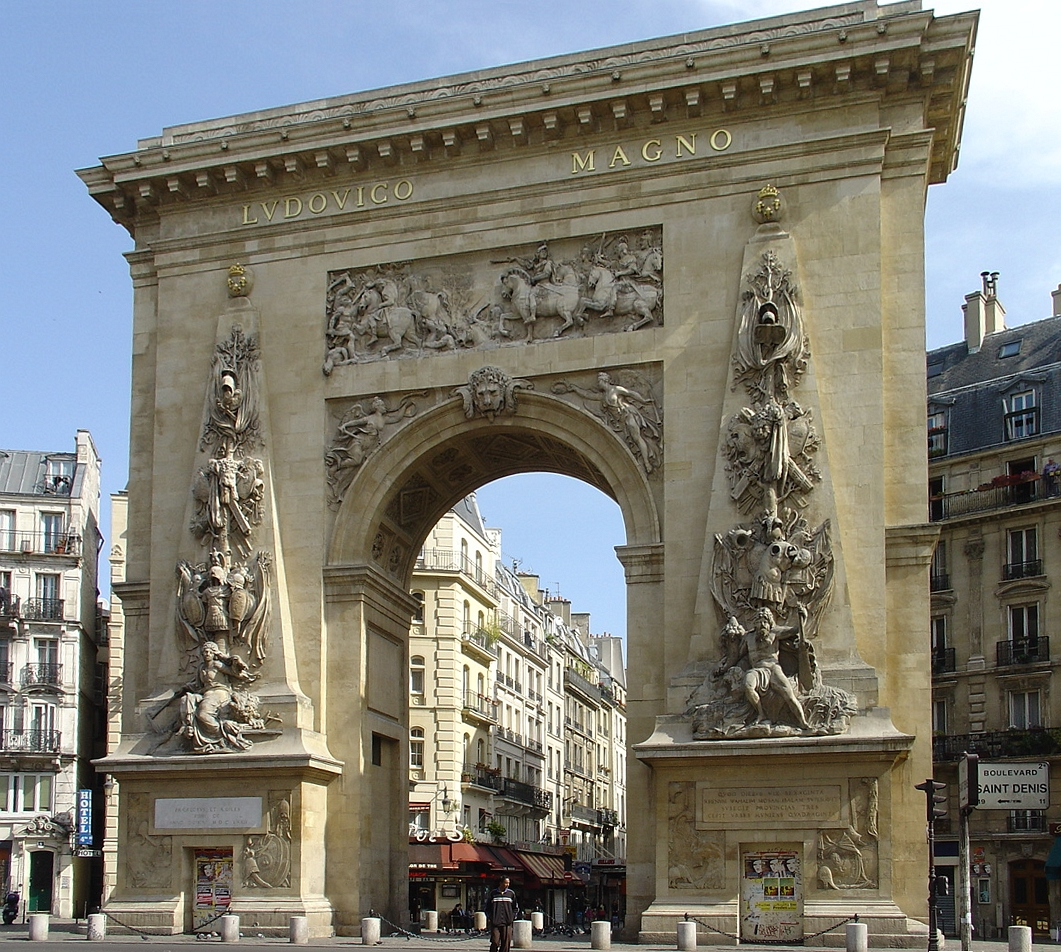 Porte Saint-Denis (Paris) .